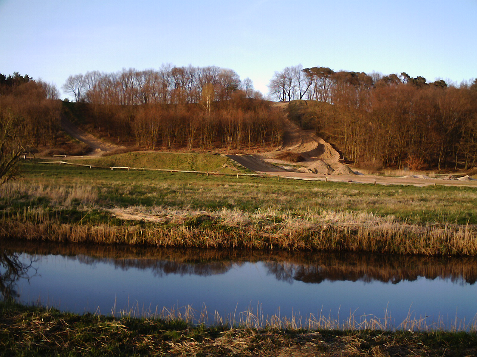 Der Ziesaberg bei Wolgast, eine als Naherholungsgebiet und Moto-Cross-Strecke genutzte Erhebung